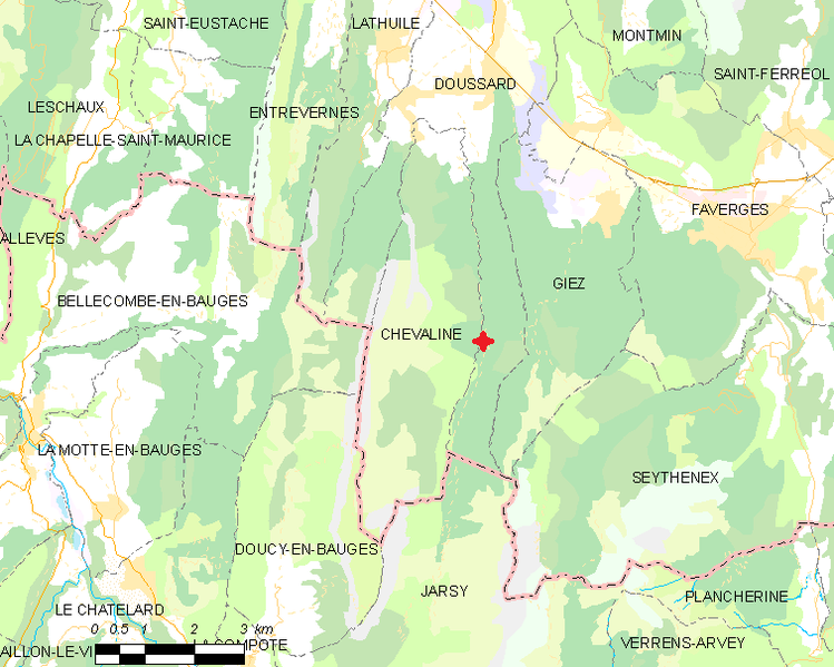 Lieu géographique de la tuerie de Chevaline